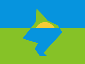 Bandera del Partido de Ramallo (Buenos Aires, Argentina).